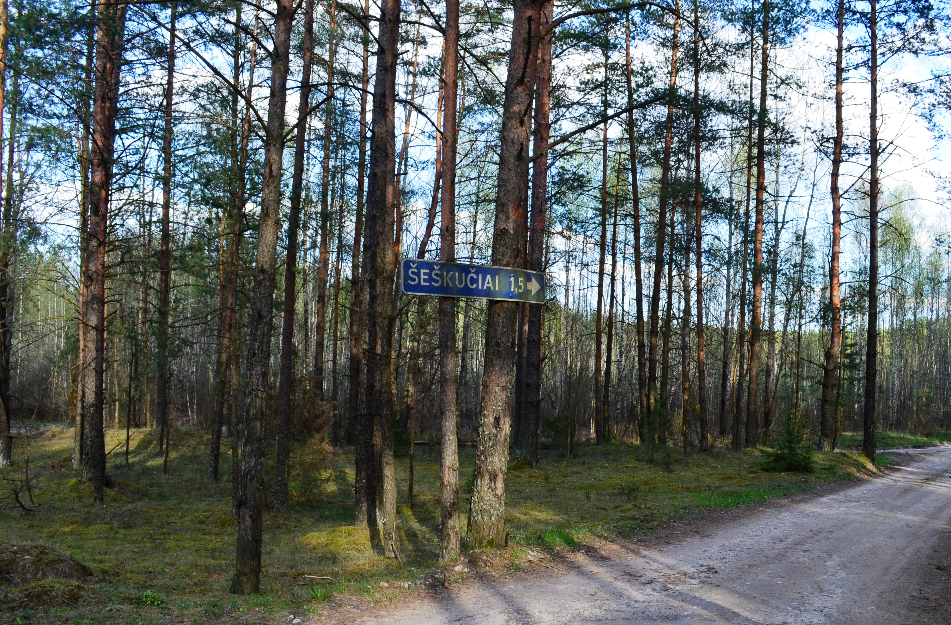 Posūkio ženklas į Šeškučius, Vilniaus r.